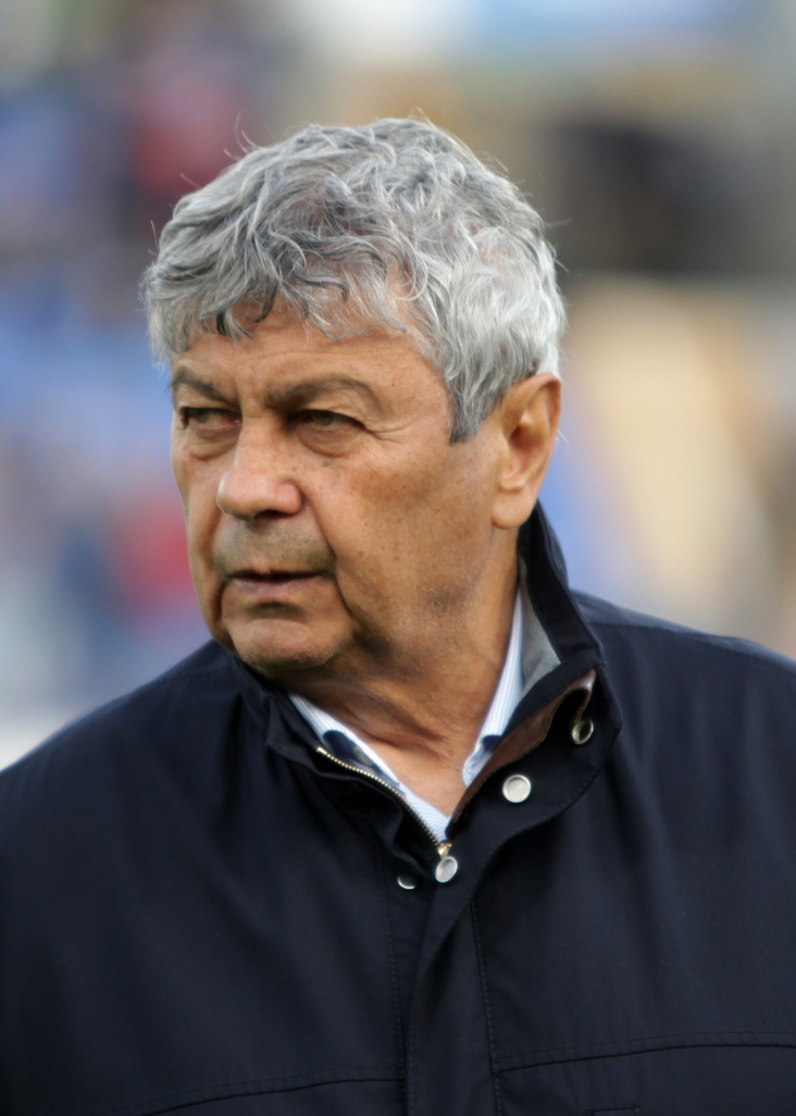 «Зенит» - «Краснодар»